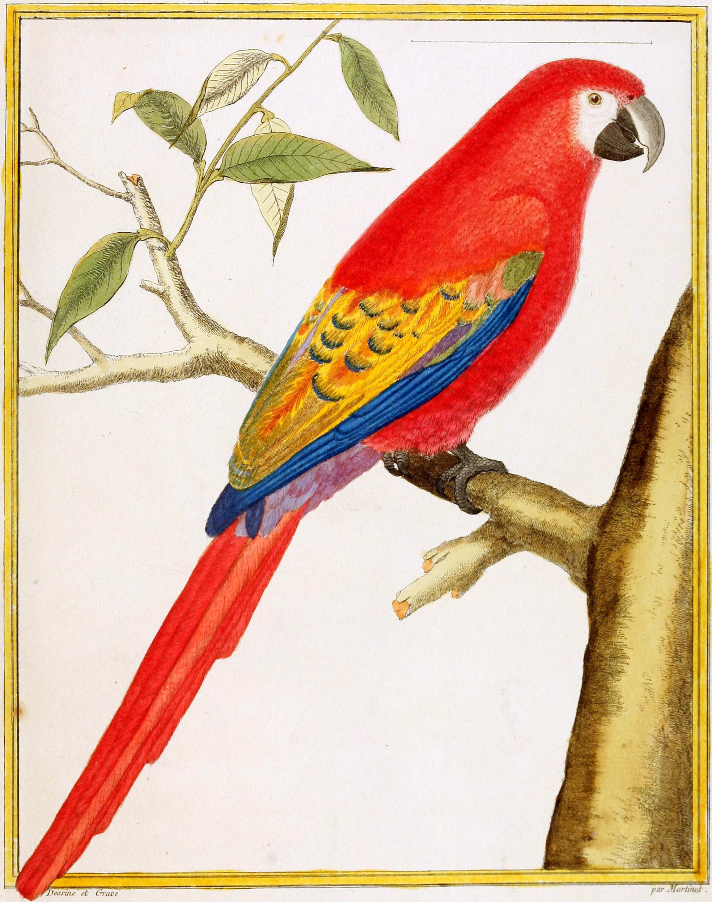 Plate from Buffon’s Planches Enluminées, pl.12.